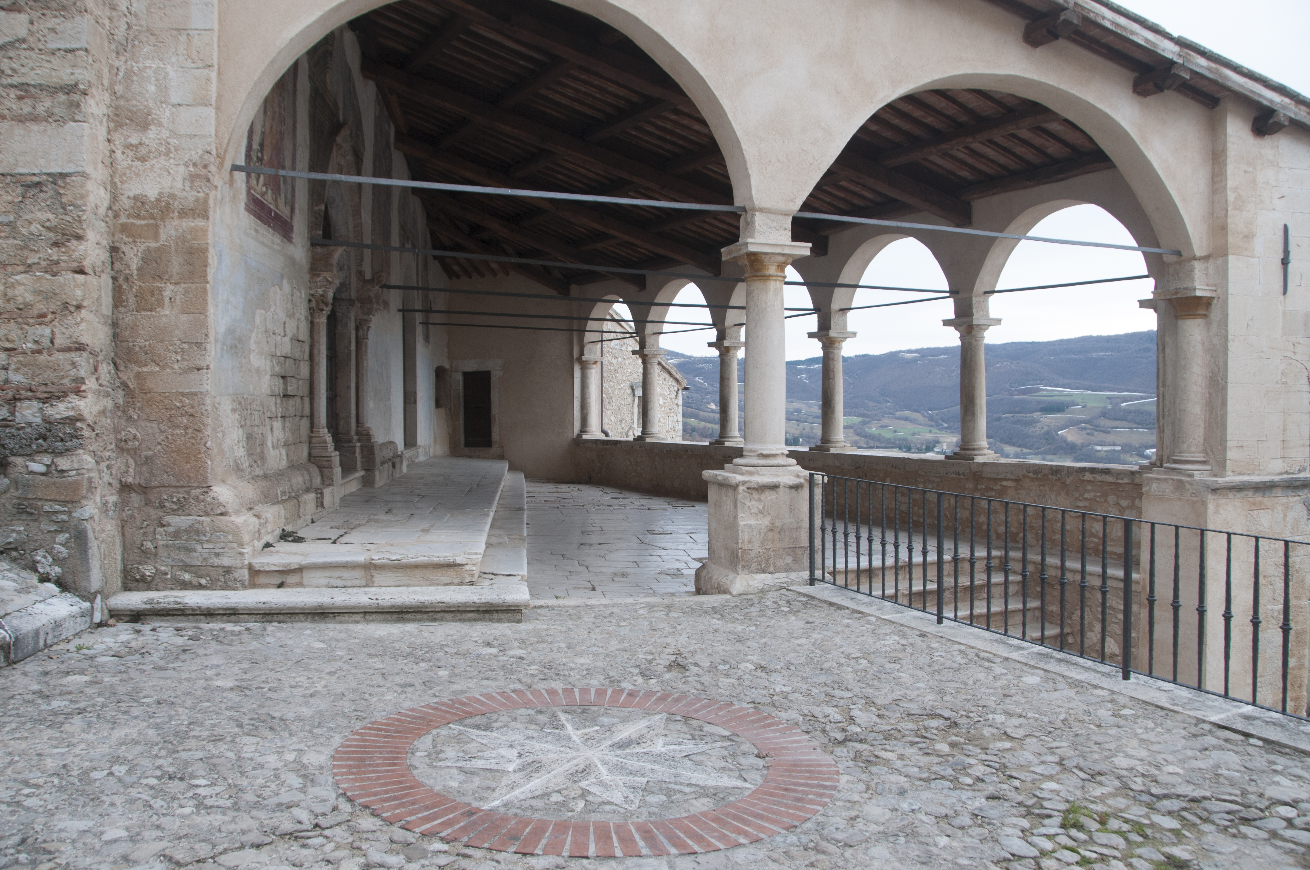 Chiesa di Sant’Andrea - Campi